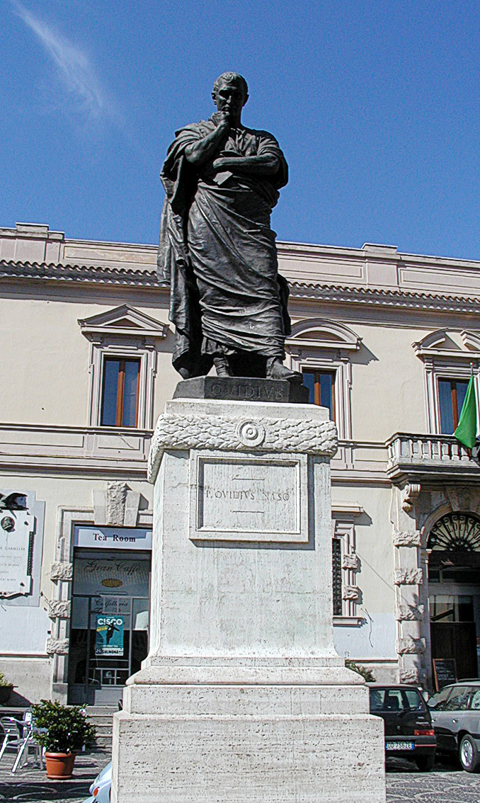 Monument to Ovid (Sulmona)